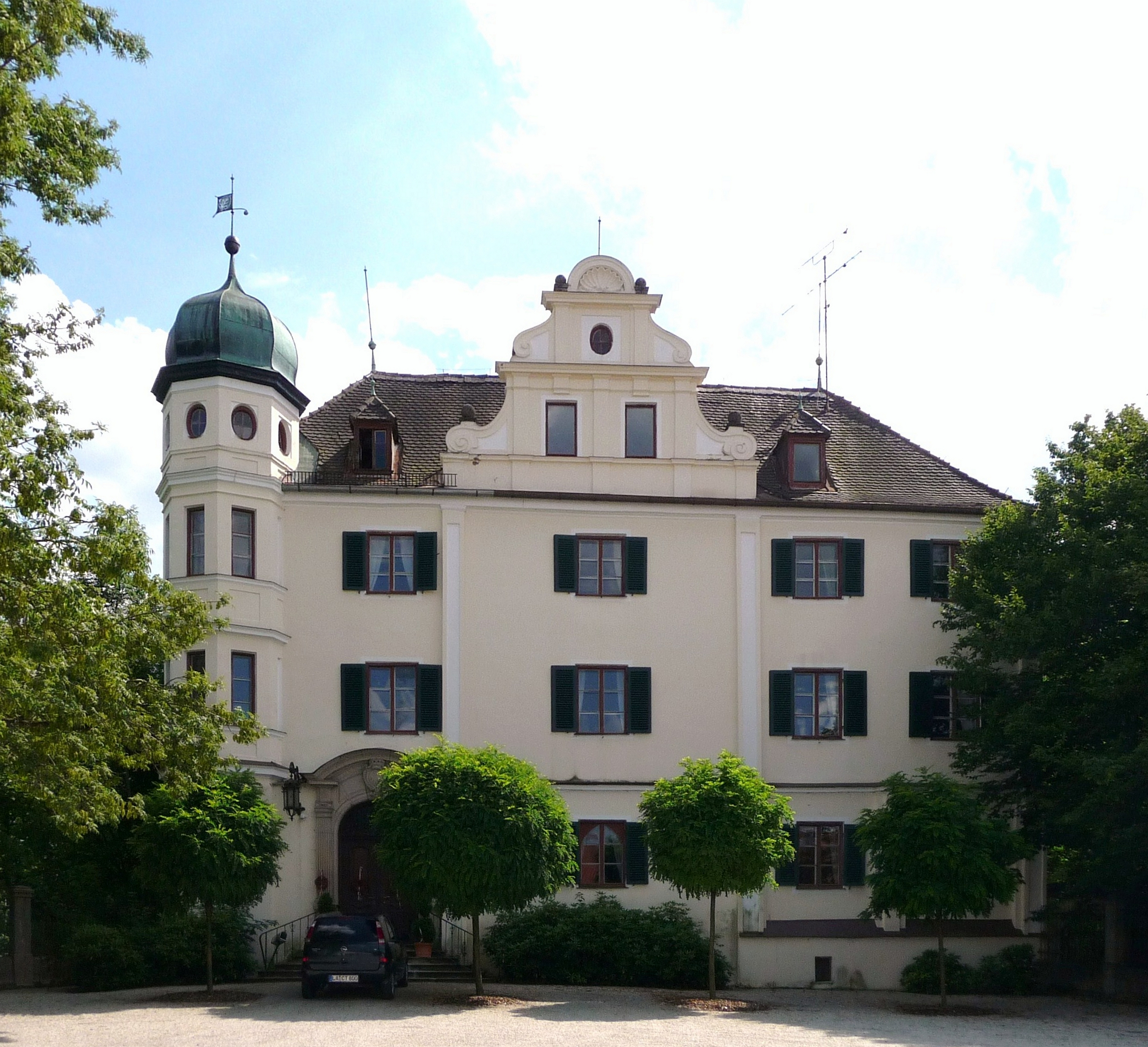 Schloss Peuerbach in Bayerbach b. Ergoldsbach